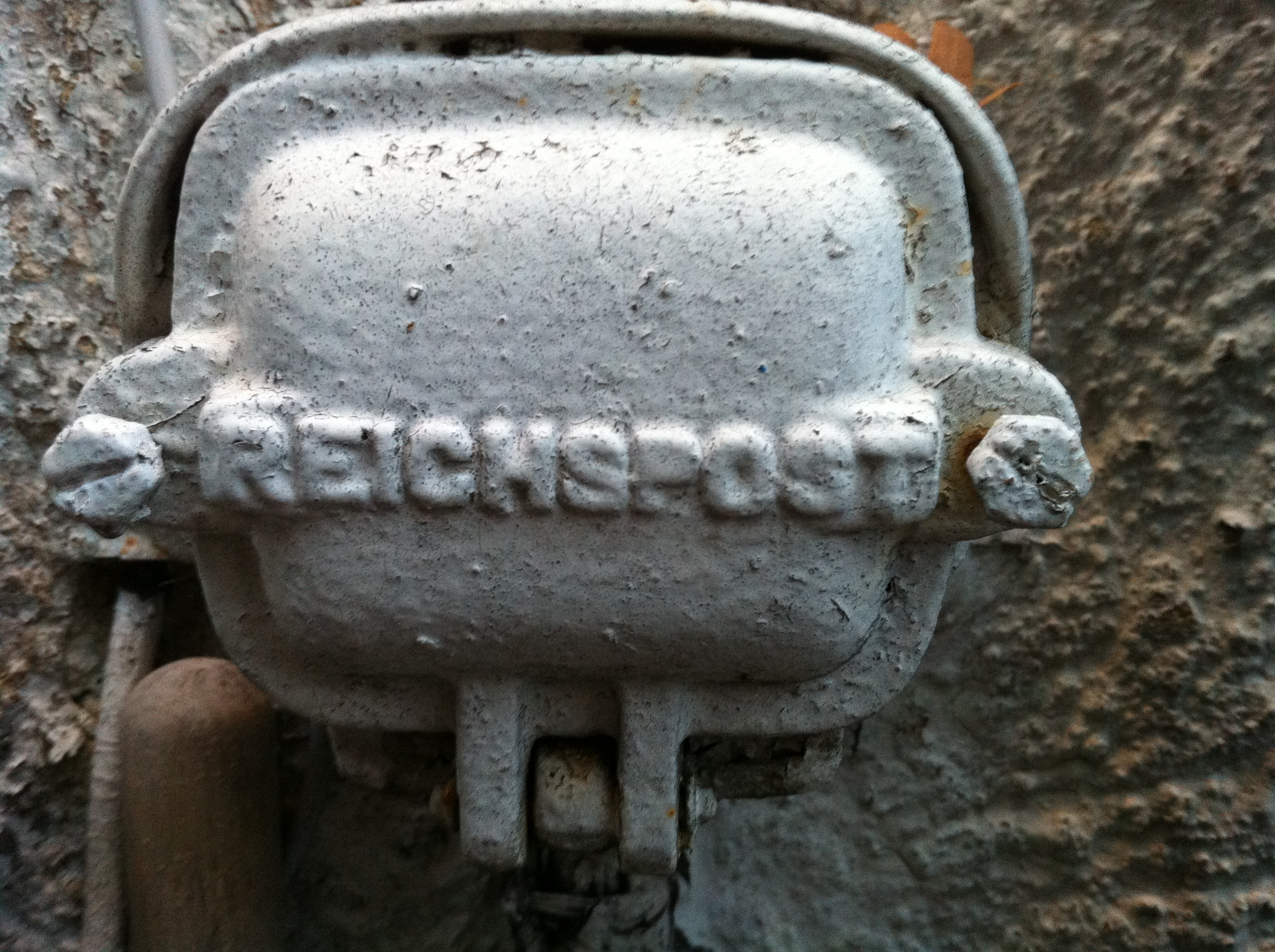 Reichspost-Stromverteiler (in Betrieb 2018) in der Gemeinde Küssaberg im Landkreis Waldshut in Baden-Württemberg.